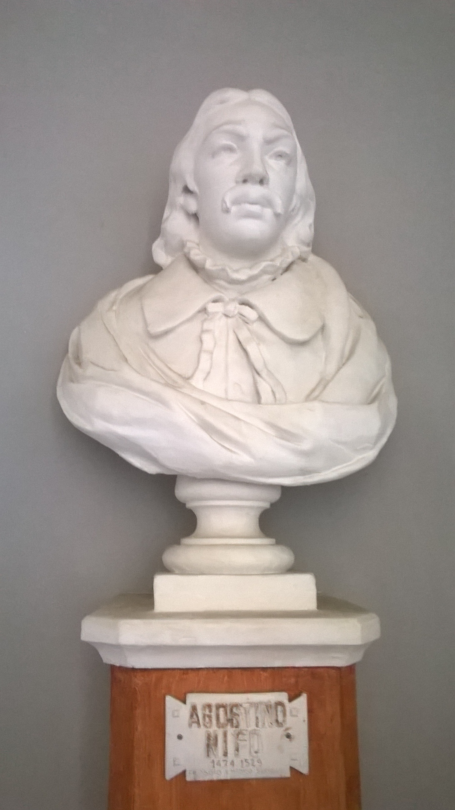 Busto di Agostino Nifo, esposto nel liceo classico omonimo di Sessa Aurunca